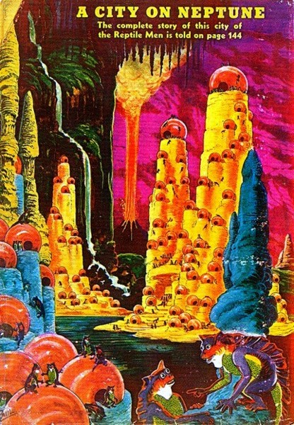 Город на Нептуне. Задняя обложка журнала Amazing Stories, март